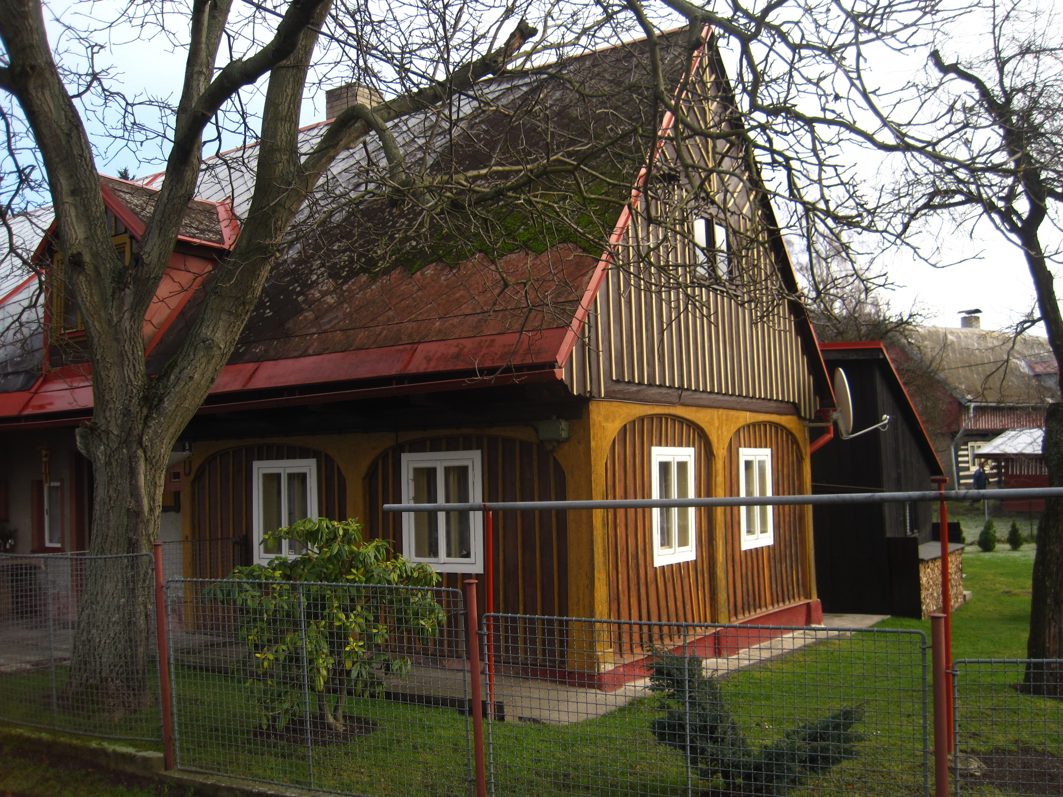 Vesec u Světlé pod Ještědem - čp. 5